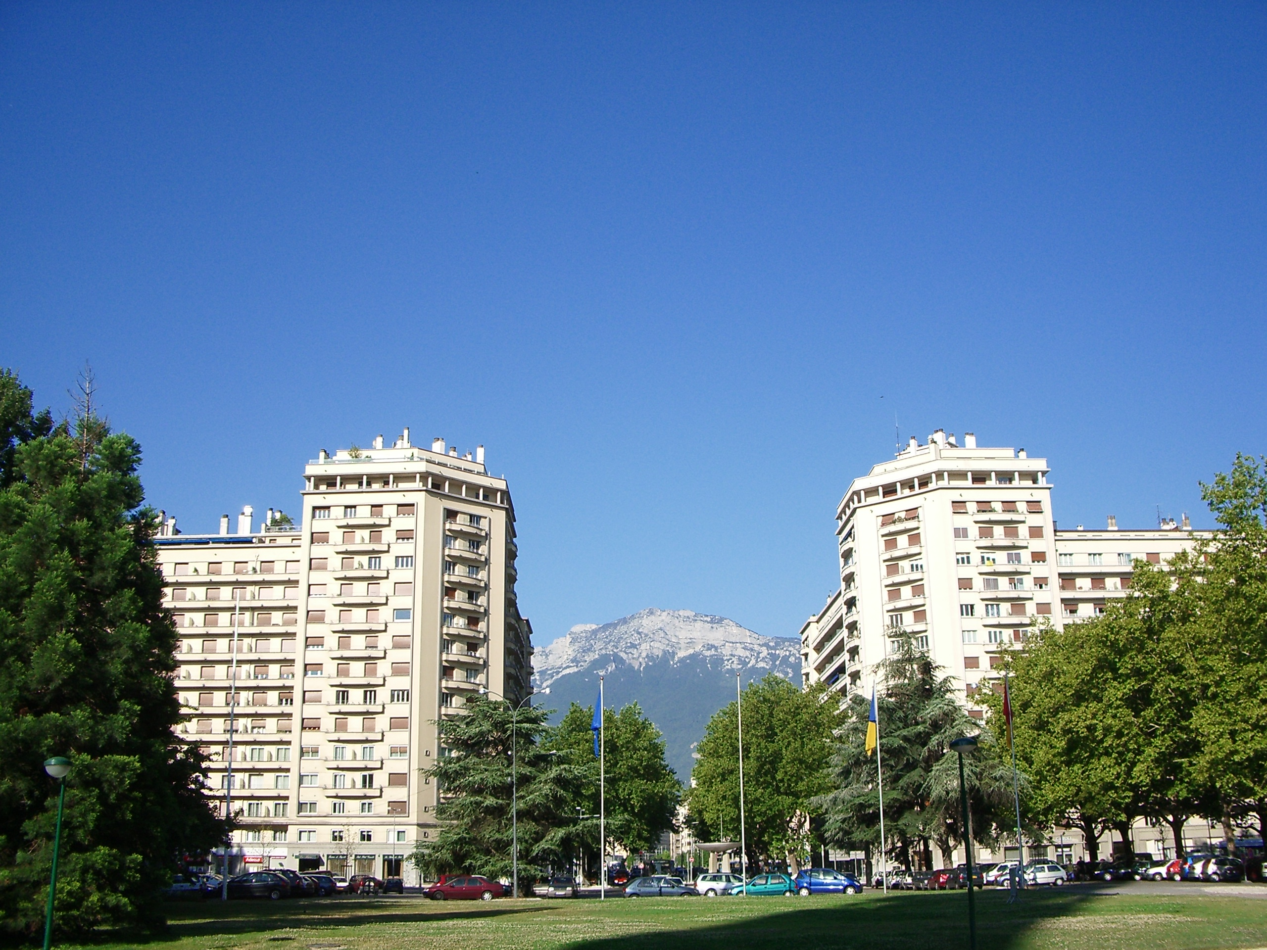 Grands boulevards de Grenoble, boulevard Joffre à partir du parc Paul Mistral, vue vers l'Ouest